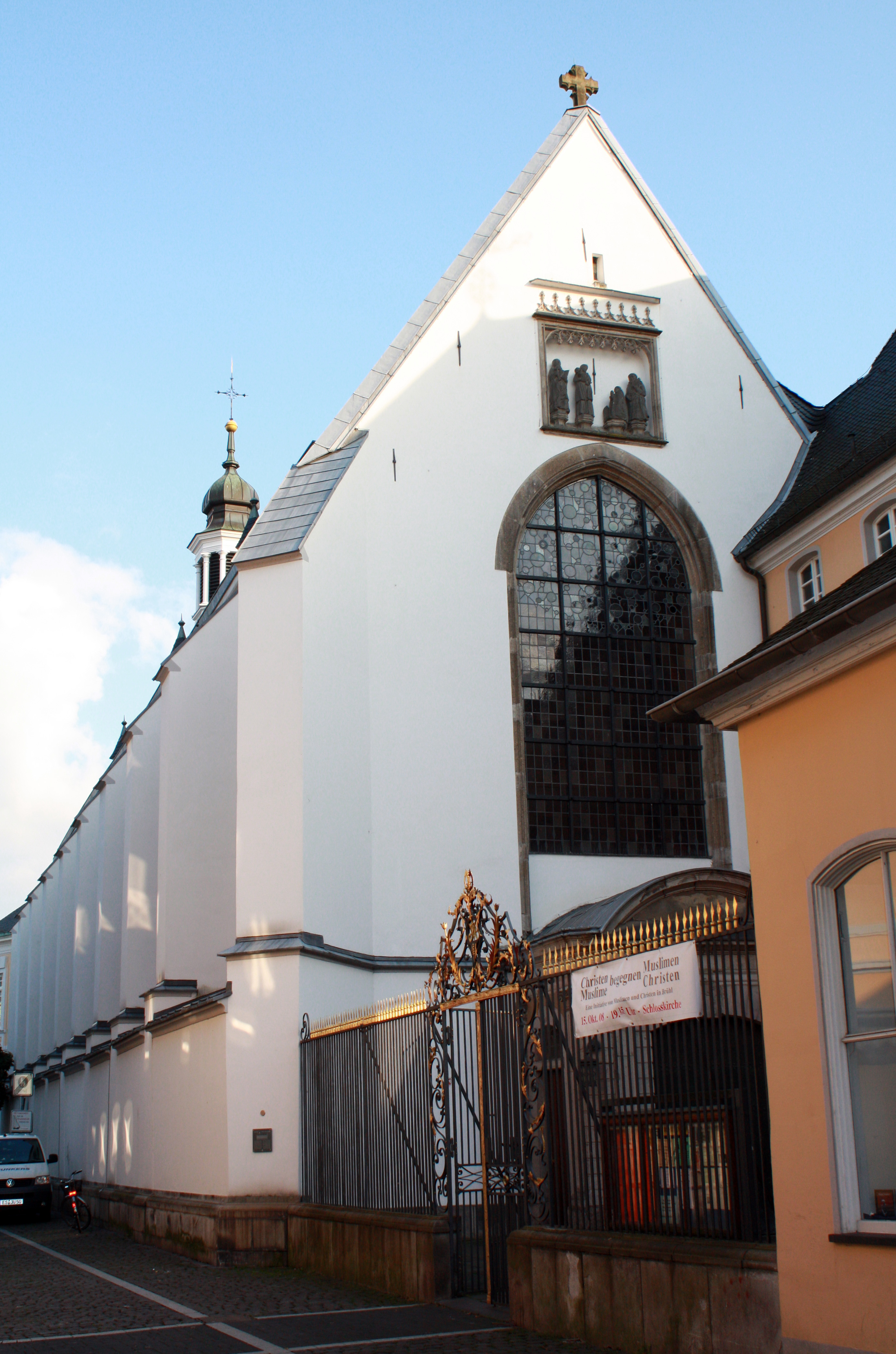 Brühl/Rhld.,Schlosskirche St. Maria von den Engeln